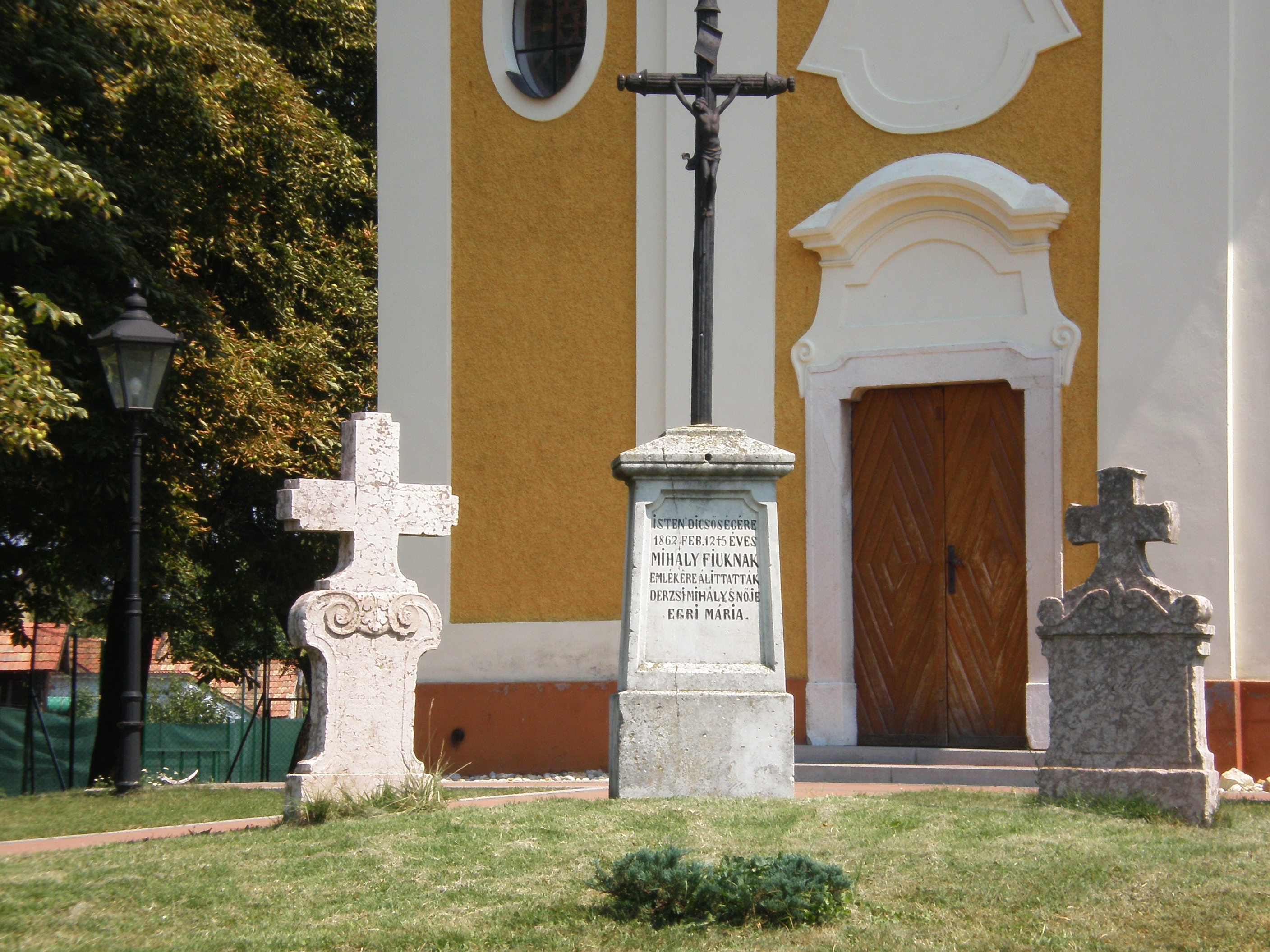 A római katolikus templom előtere (Győrzámoly, Győr-Moson-Sopron megye, Magyarország)